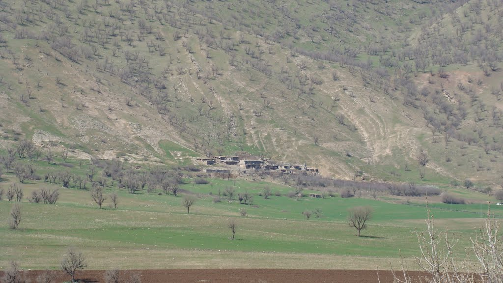 کوردی: گوندی دێکۆنی ماوەت